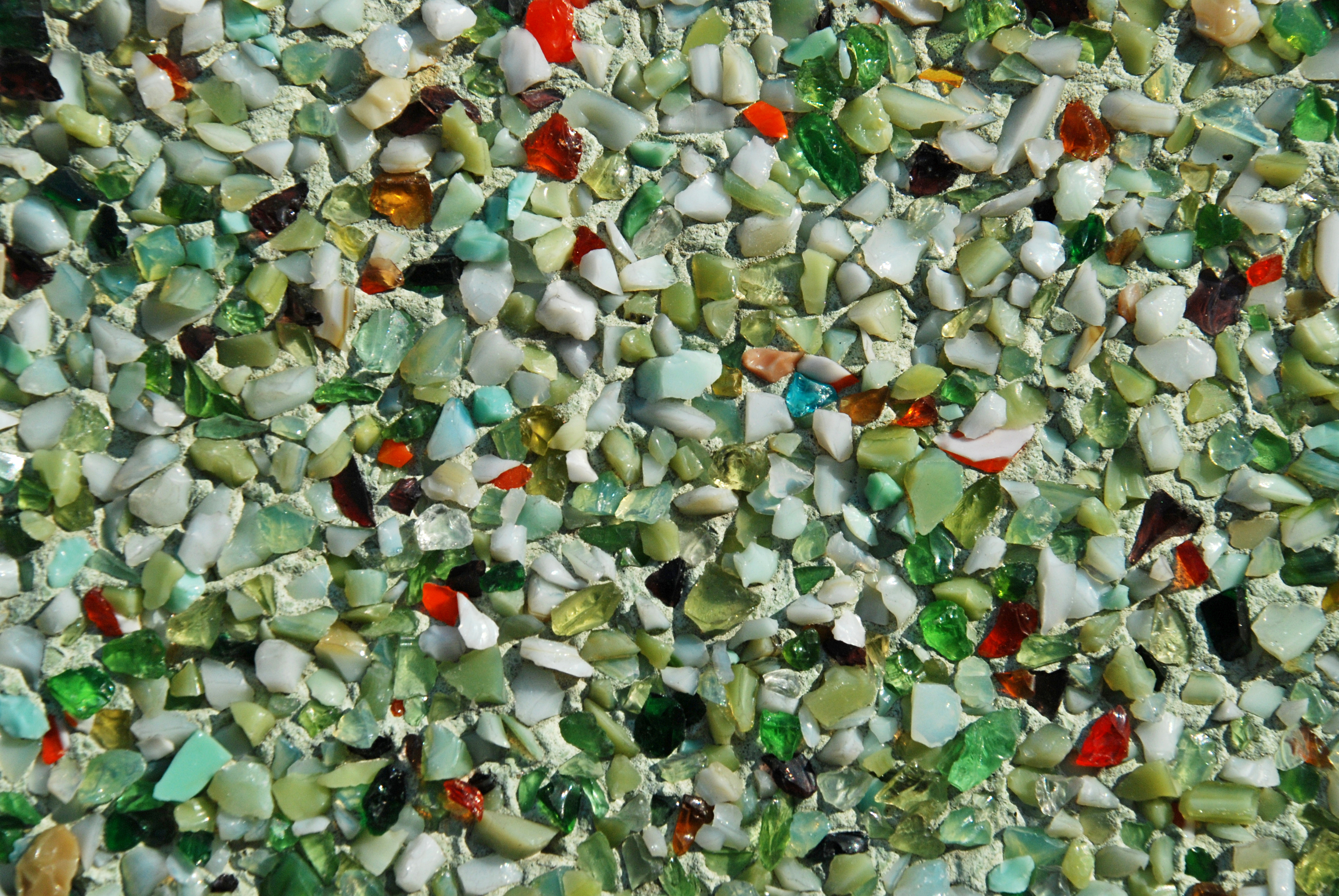 Belgique - matériau appelé cimorné utilisé durant la période Art déco en milieu rural